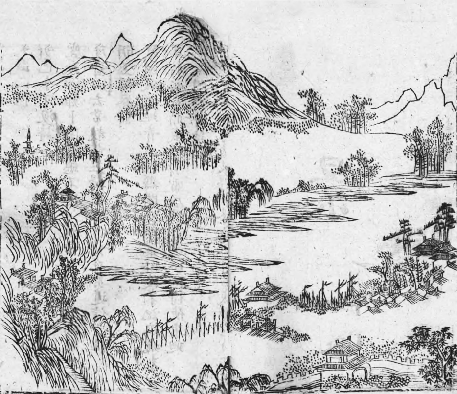 清朝乾隆年间，固始县的八景之首大山雨信的景象